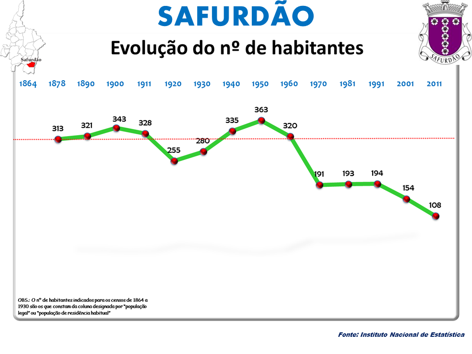 Censo 1864/2111